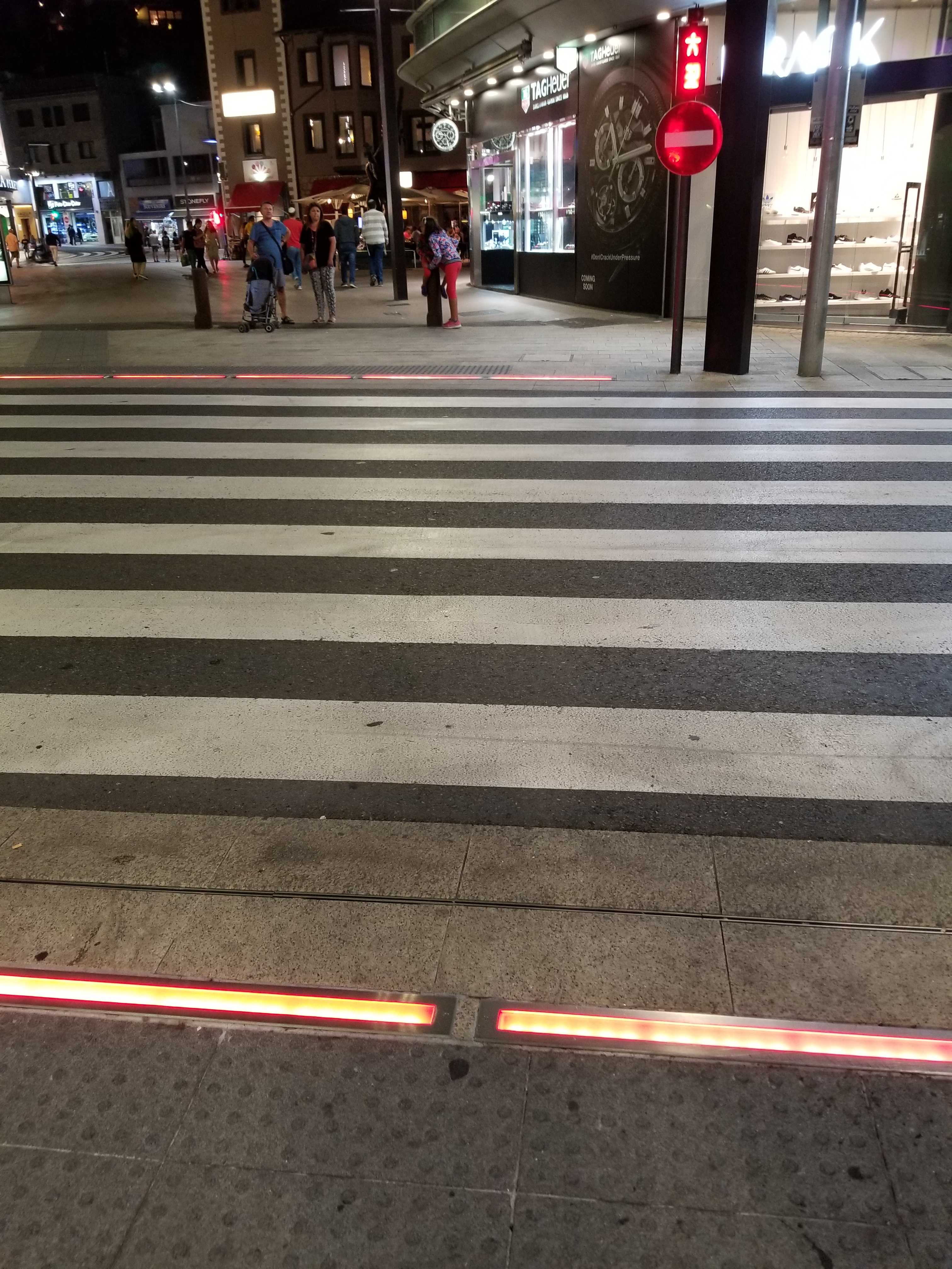 רמזור על רצפת המדרכה